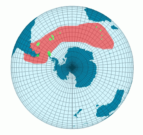 Carte représentant les zones de reproduction et d'habitat du manchot Gorfou doré. En rouge, les zones ou le manchot Gorfou doré vit. En vert, les zones ou le manchot Gorfou doré se reproduit. Créer Par BRUCHET Sébastien et sous license GFDL. (Utilisation de File:MapS.png pour la création)